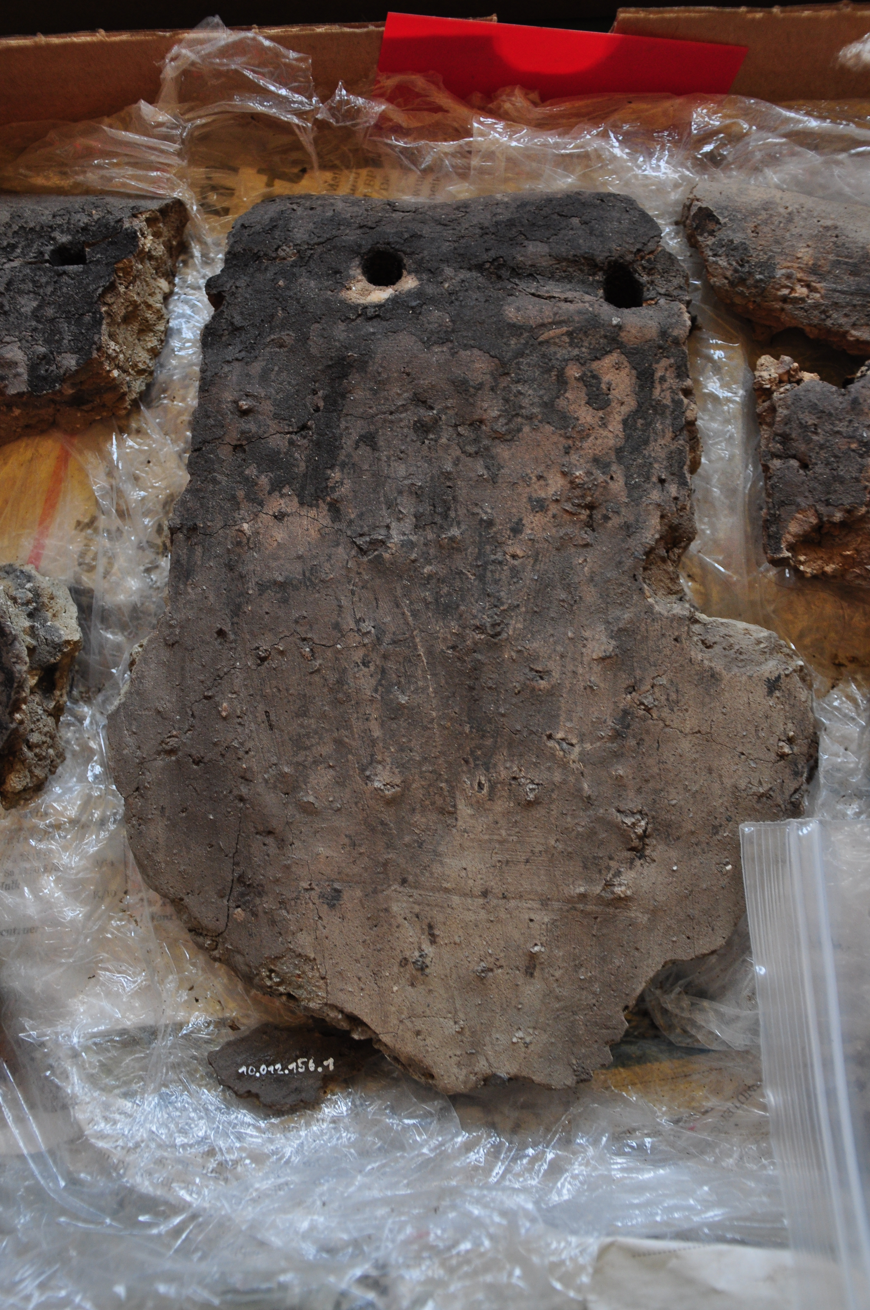 Archäologische Grabung Parkhaus Opéra in Zürich (Switzerland) : Keramikscherben der Horgener Kultur